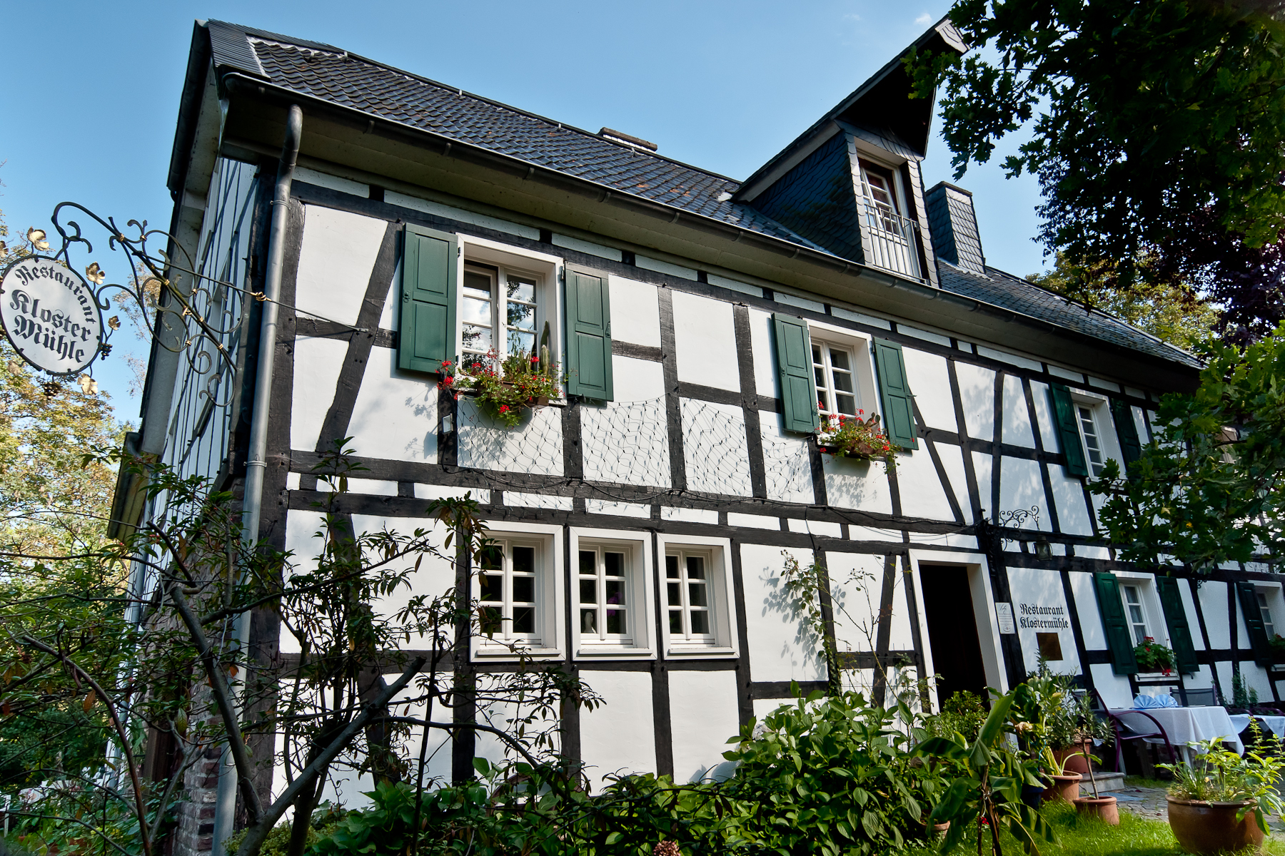 Rösrath, Denkmalnummer 19, Zum Eulenbroicher Auel 15 (Klostermühle)